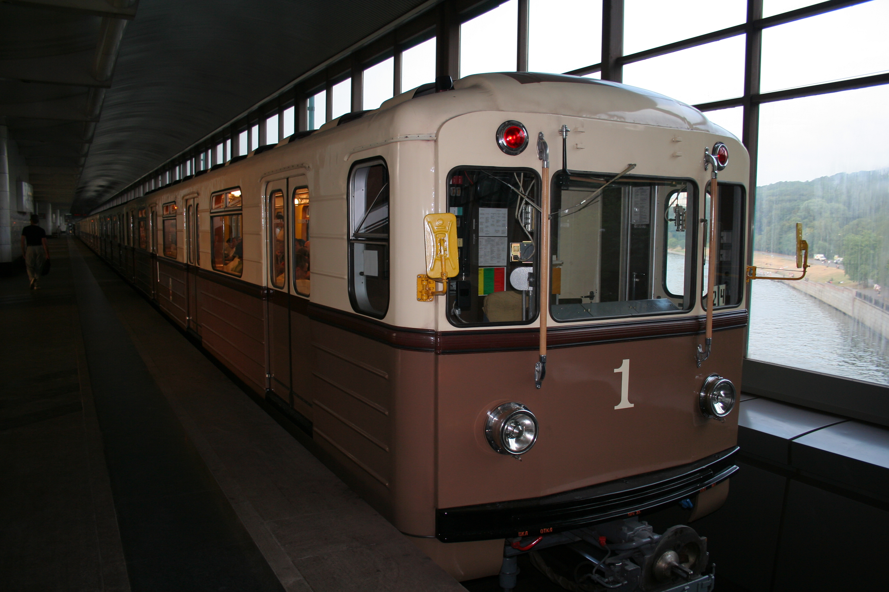 Der Retro-Zug der Moskauer Metro, hergestellt 2010.